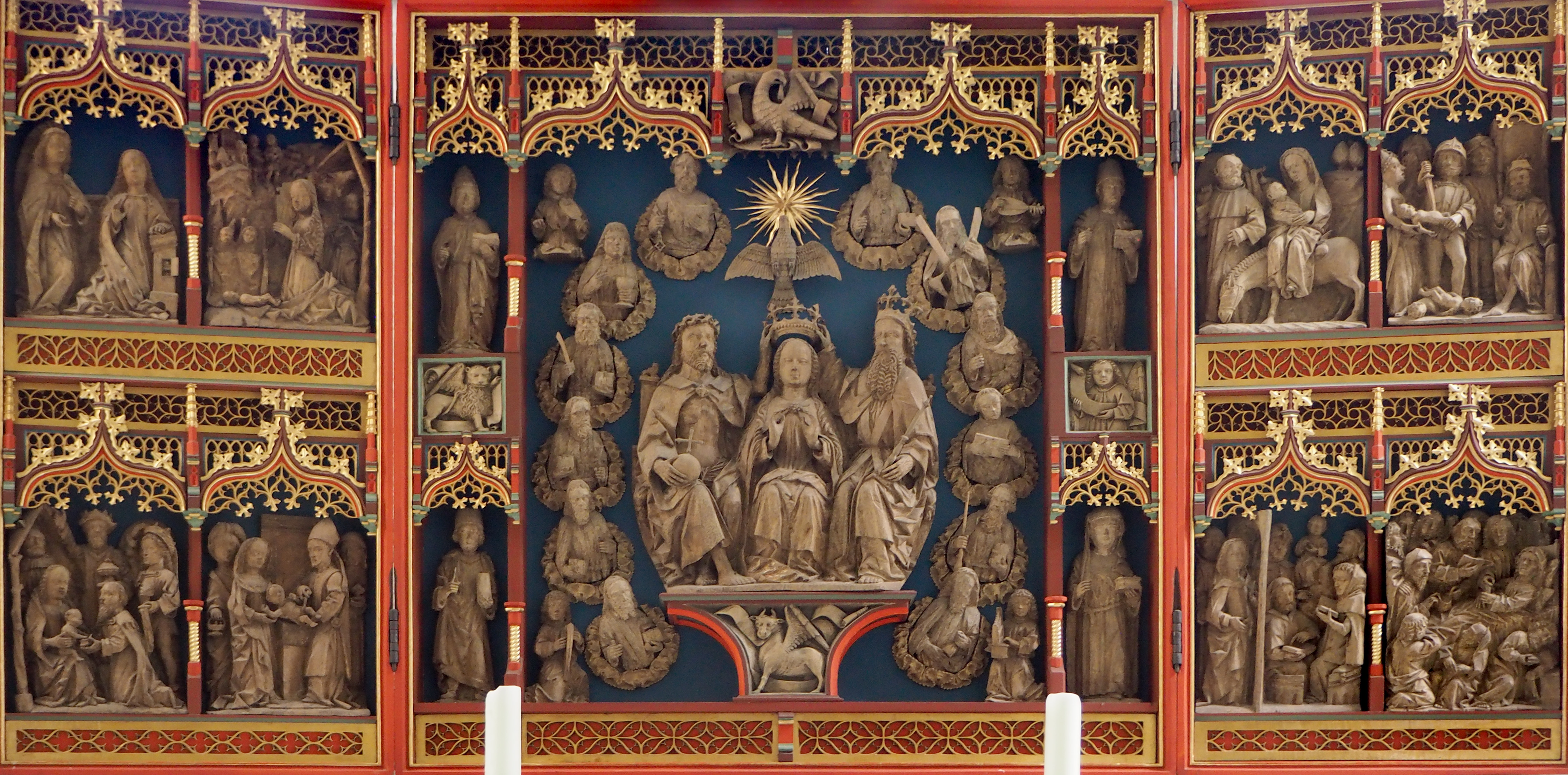 Clus (Bad Gandersheim) – Schnitzaltar der Klosterkirche – Foto 2019 Gotischer Schnitzaltar in der ehemaligen Klosterkirche Clus, der 1487 in Lübeck erworben wurde. Die Klosterkirche Clus wurde 1127–1159 als dreischiffige Basilika erbaut.1485 entstand der gotische Chor.